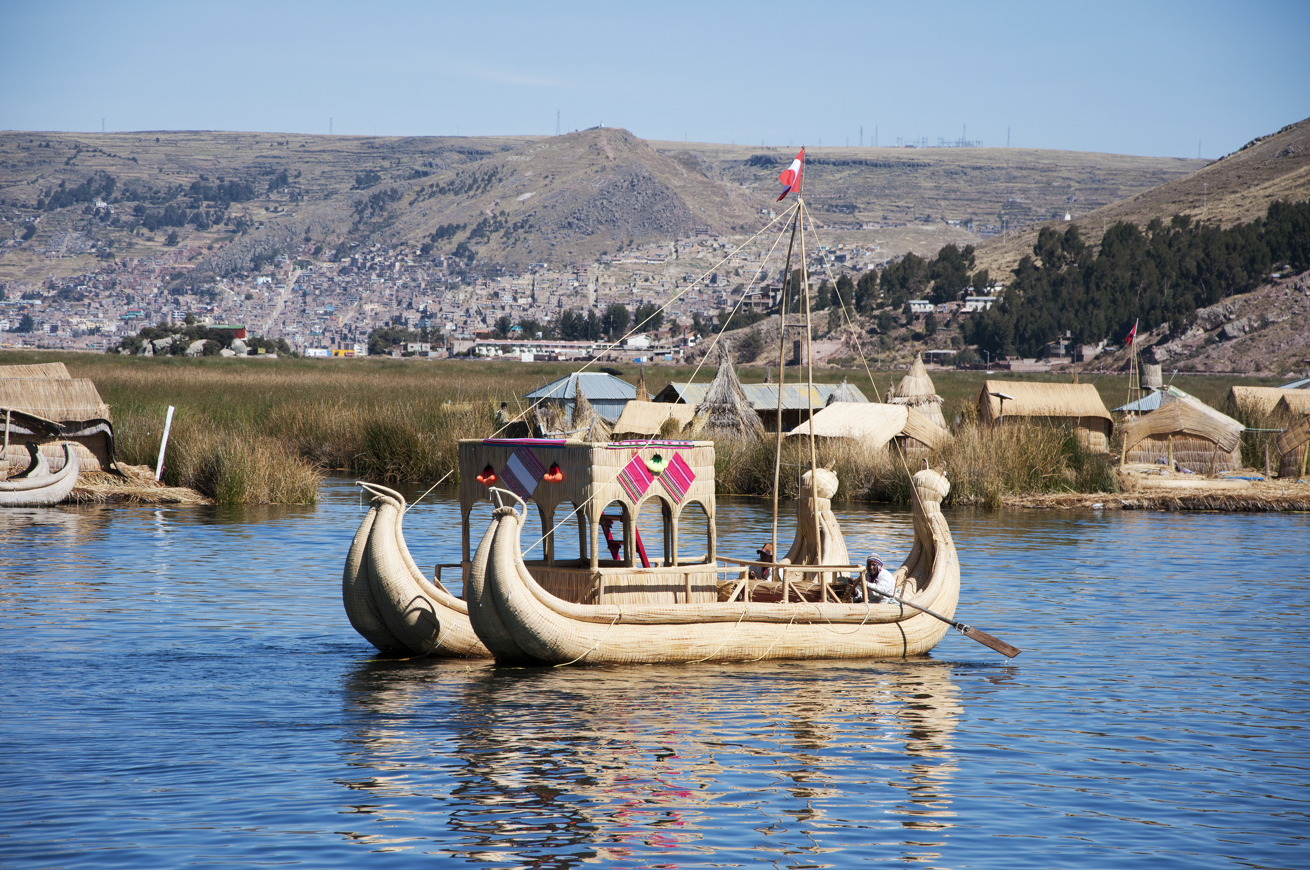 Embarcaciones de totora nativa en Puno